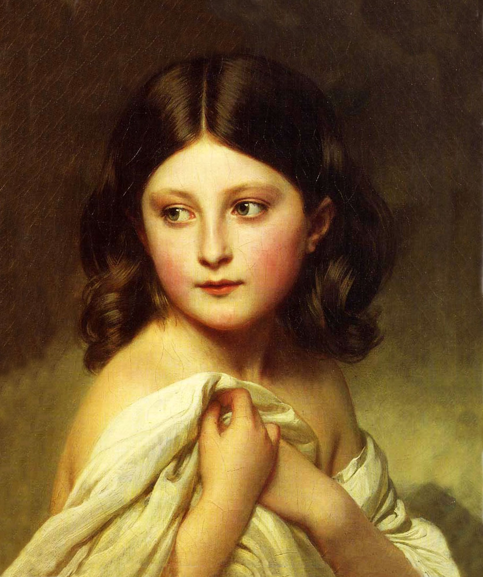 Allegorie van de schaamte - formerly identified as Prinses Charlotte van België